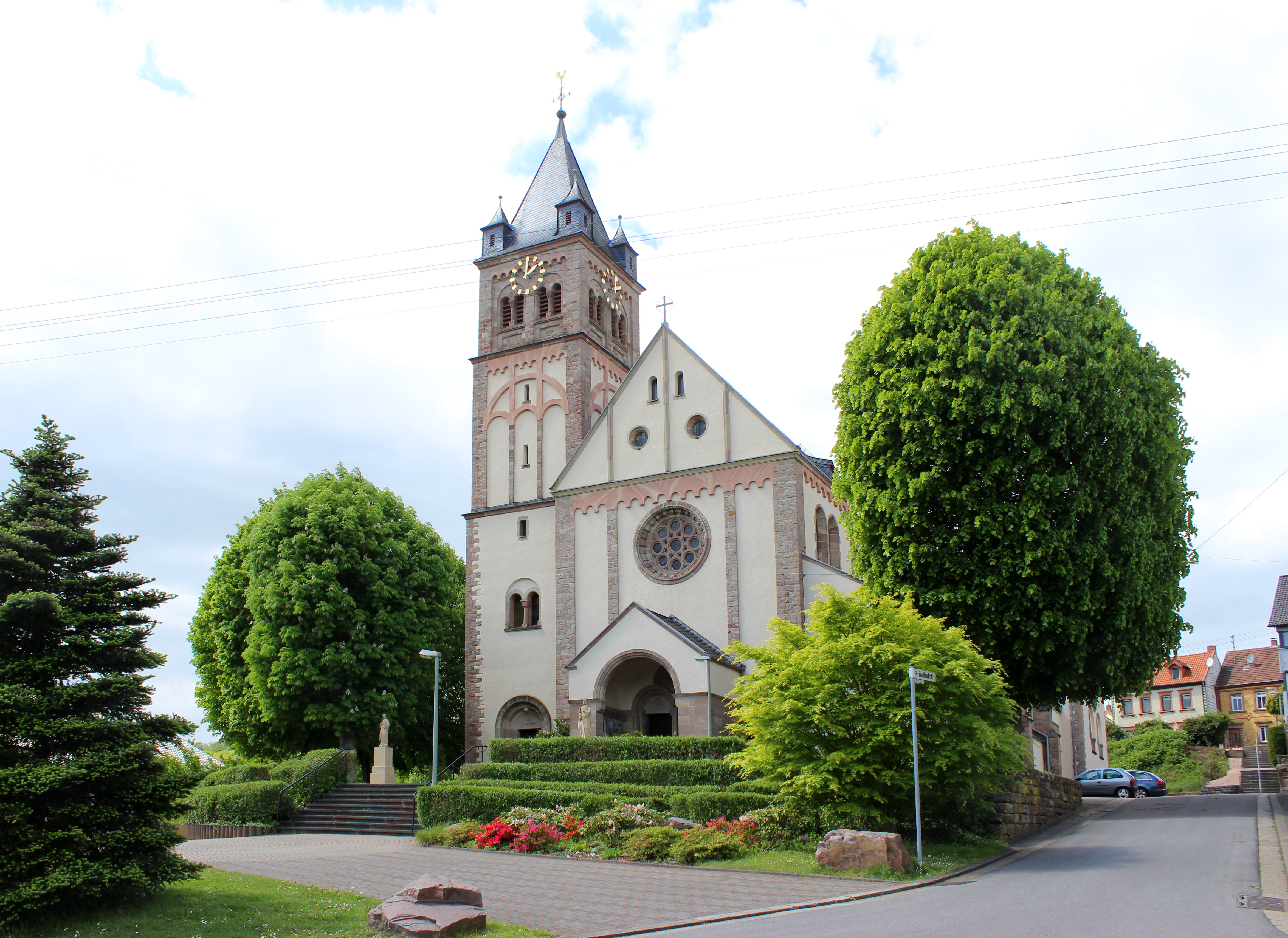 Die katholische Pfarrkirche St. Josef in Fischbach-Camphausen, Gemeinde Quierschied, Regionalverband Saarbrücken, Saarland